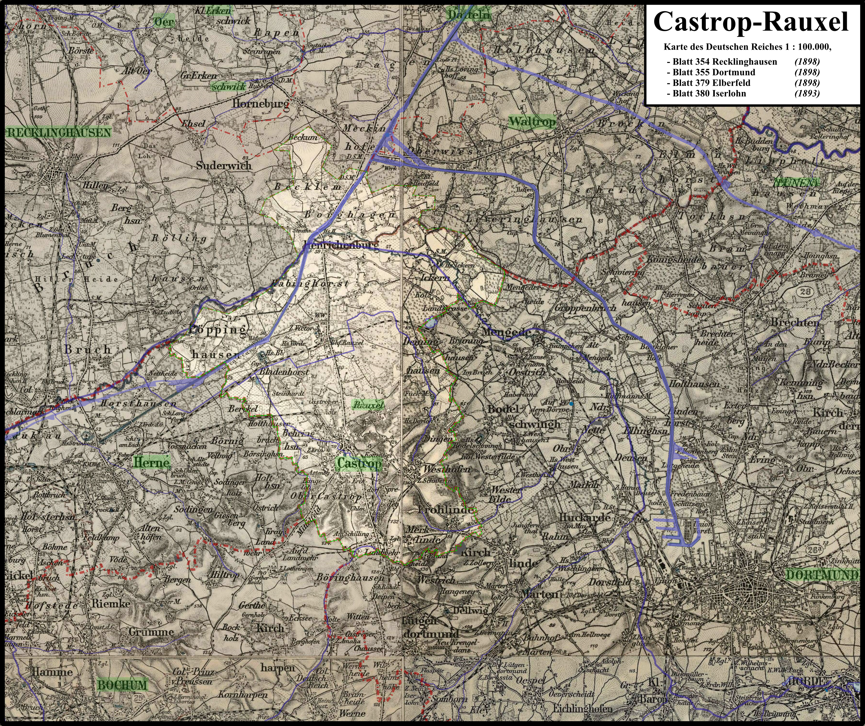 Karte der Stadt Castrop-Rauxel auf Basis der Karte des Deutschen Reiches| 1 : 100.000, Ende des 19. Jahrhunderts;Verwaltungsgrenzen (rot), Kanäle, Flüsse und Seen entsprechen dem heutigen Stand/Verlauf; heutige Stadtnamen sind hellgrün hervorgehoben (damalige Stadtnamen in Großbuchstaben), aufgehellt und hellgrün umgrenzt ist die heutige Stadt Castrop-Rauxel.